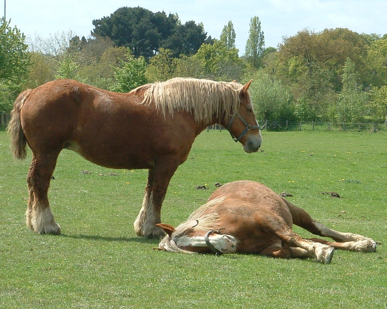 Deux juments Trait breton à l'écomusée du pays de Rennes, Ferme de la Bintinais, Rennes, France